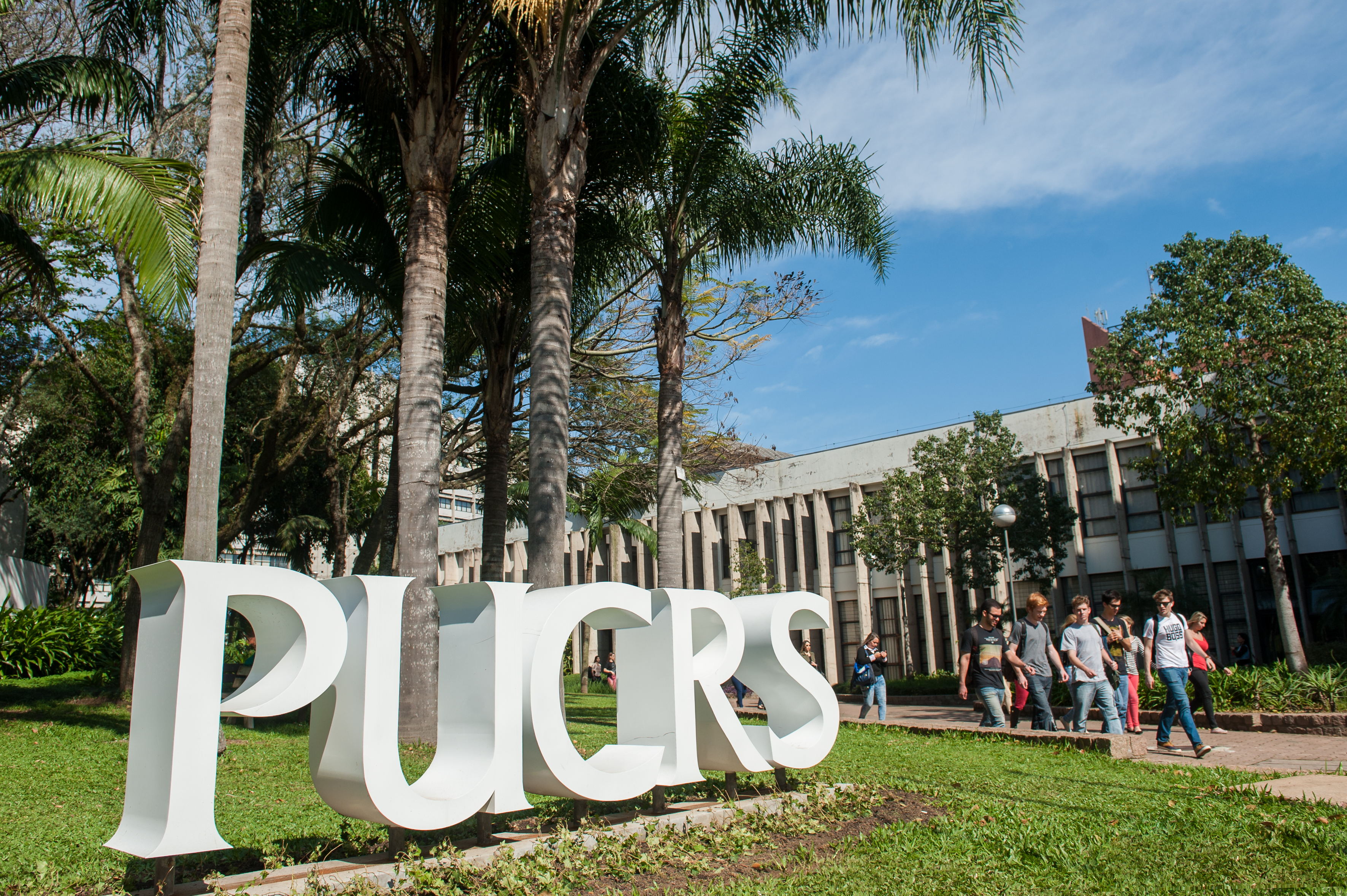 Campus Central